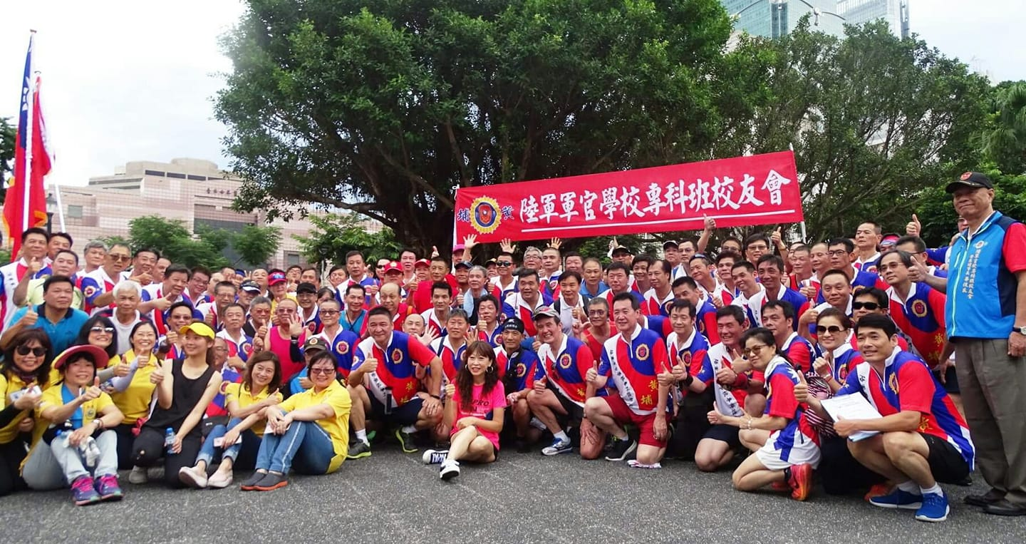 2019年6月9日陸官專科班校友會「愛國家愛國旗護臺灣」環島首站路跑活動